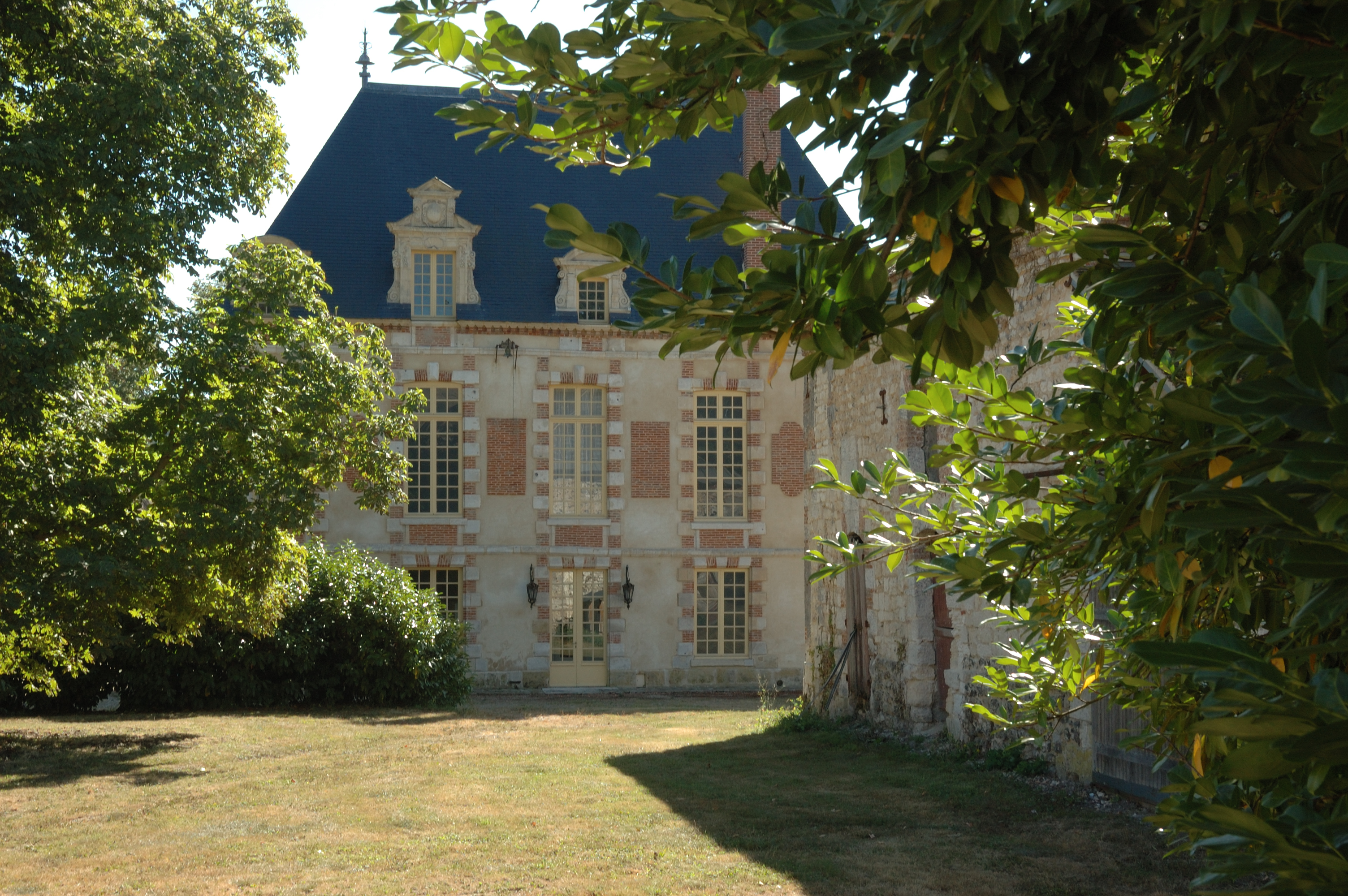 Façade Nord .